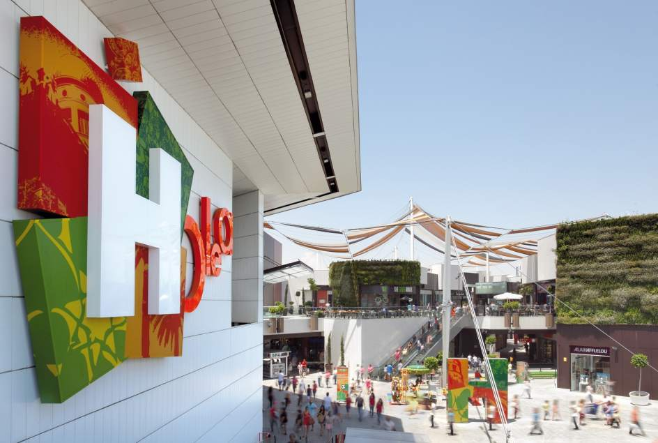 Puerta de entrada del Centro Comercial